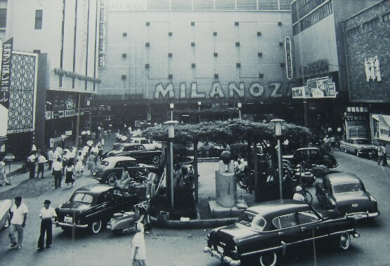 東京都新宿区歌舞伎町、左地球会館、正面新宿ミラノ座、右新宿オデオン座・新宿劇場、1959年5月の写真。